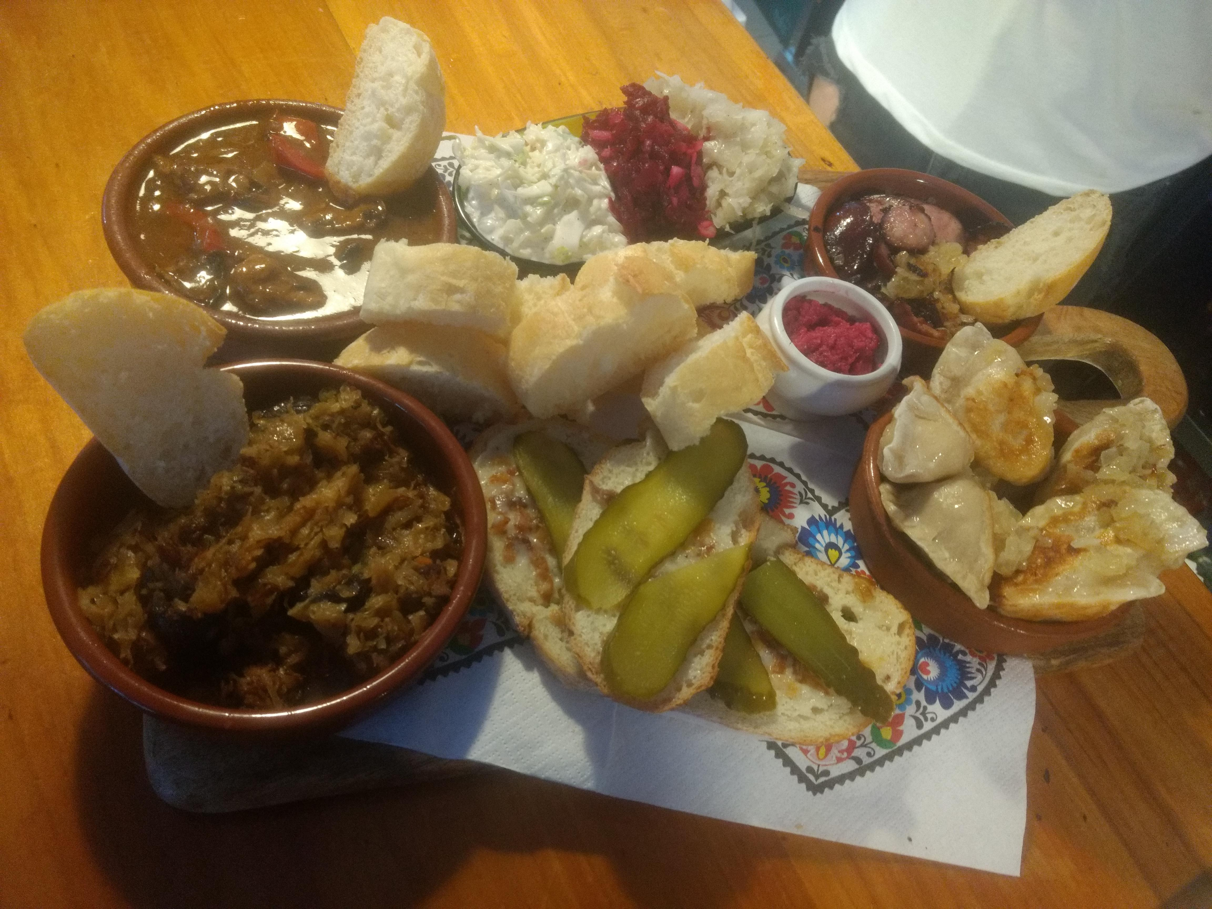 Assortit de menjars polonesos al restaurant "U Polek" de la ciutat de València.